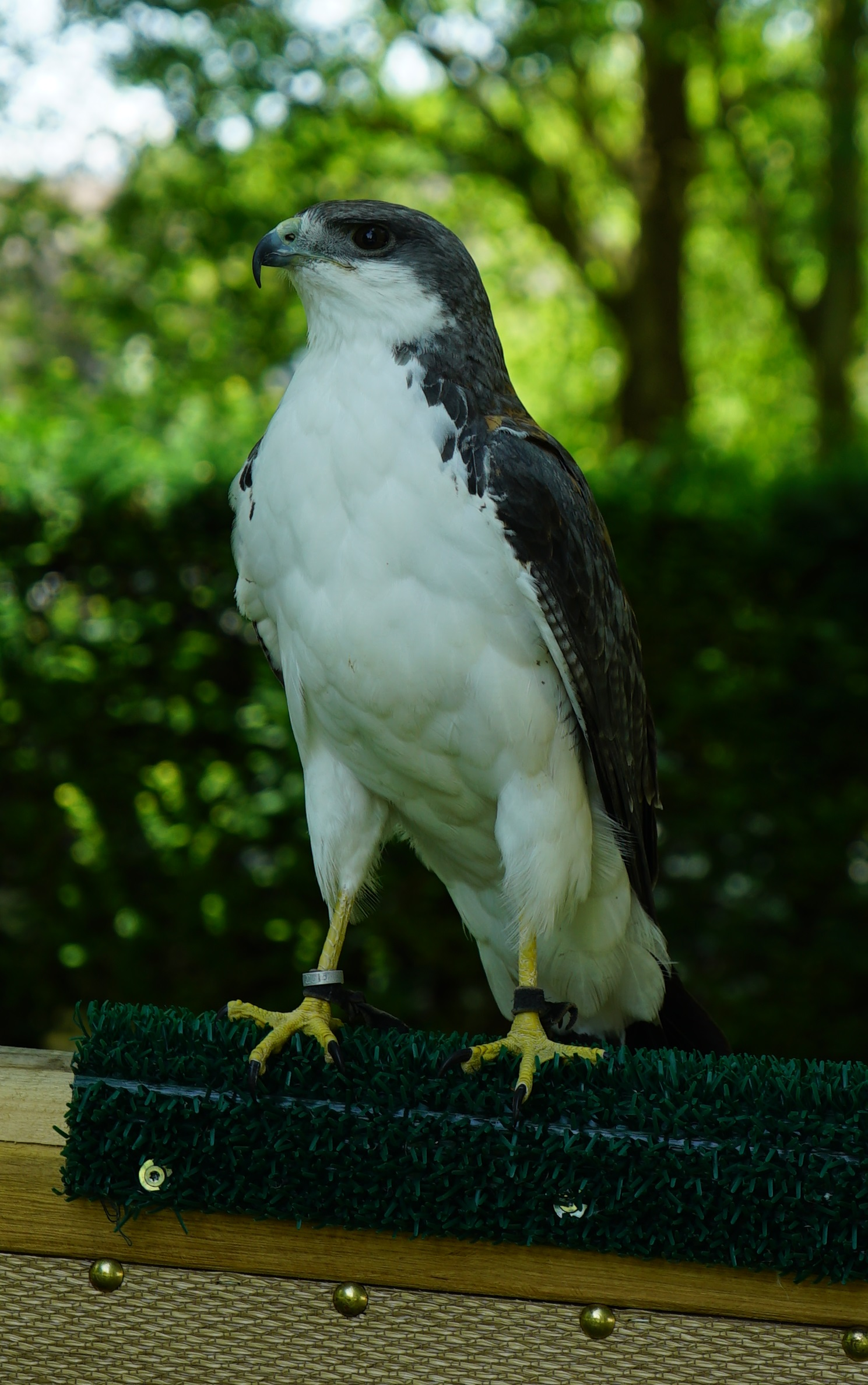 dans le parc du château en 2019.